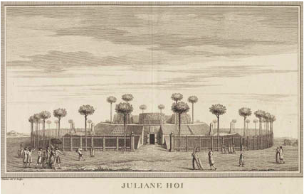 Julianehøj (1779-1781) ved Jægerspris Slot